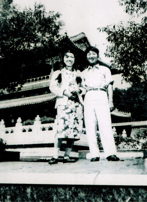 林昭与其未婚夫甘粹摄于北京景山公园